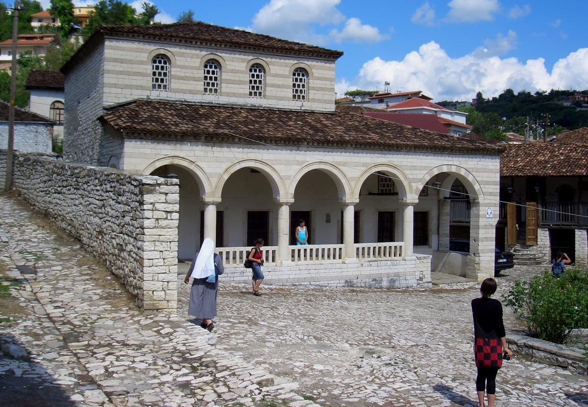 Gebäude der ehemaligen Halveti-Teqe im Zentrum Berats